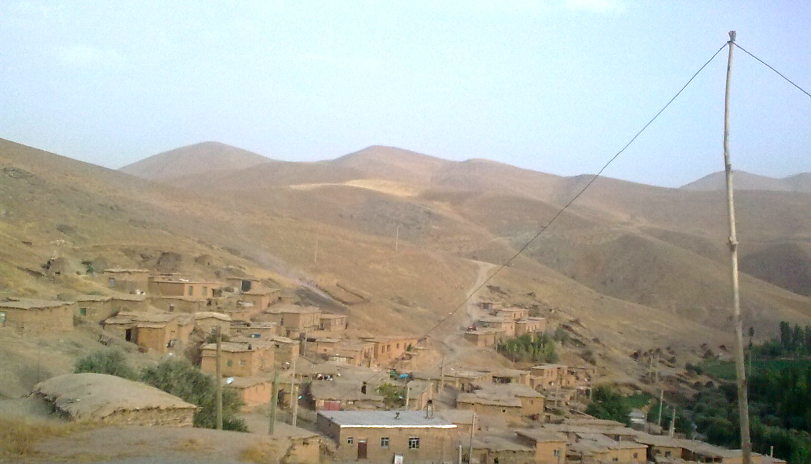 نمای از روستای آّبباره